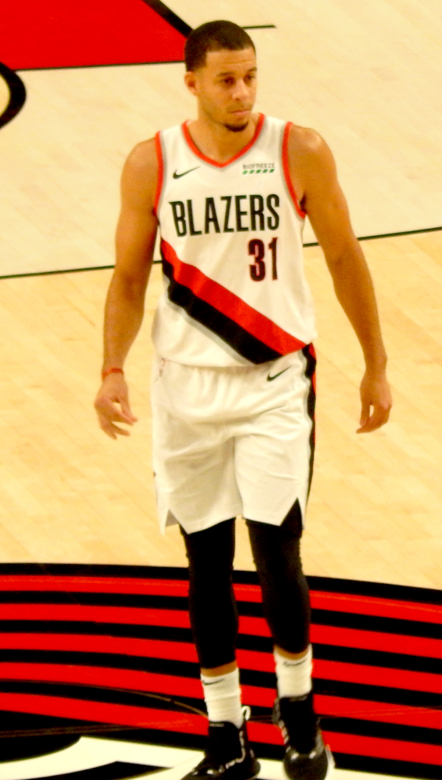 Seth Curry #31 of the Portland Trail Blazers against the Utah Jazz on October 7, 2018 at Moda Center in Portland, Oregon.